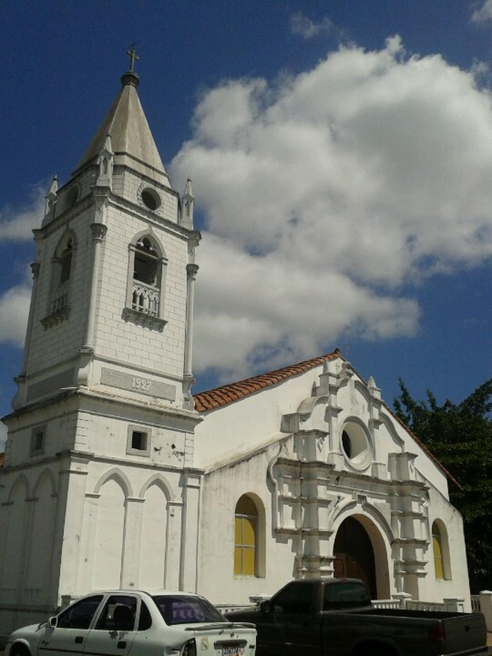 Fundada en 1927